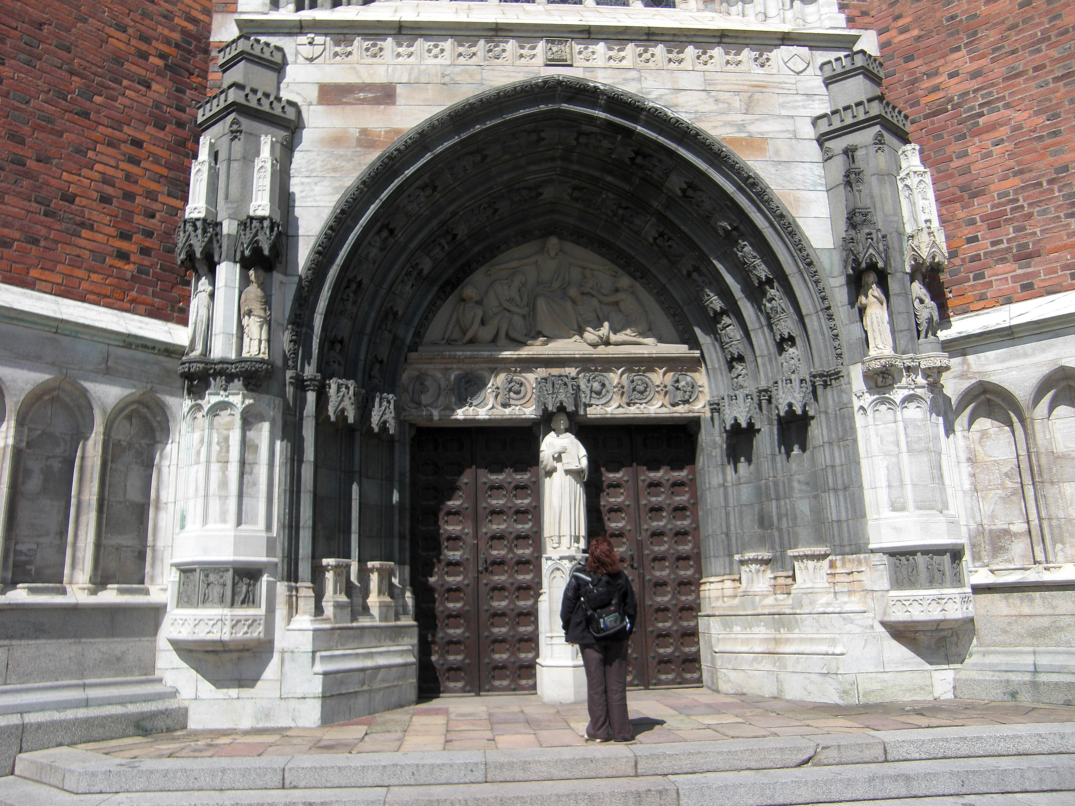 Södra portalen på Uppsala domkyrka. Användaren Fragarias syns på bilden.